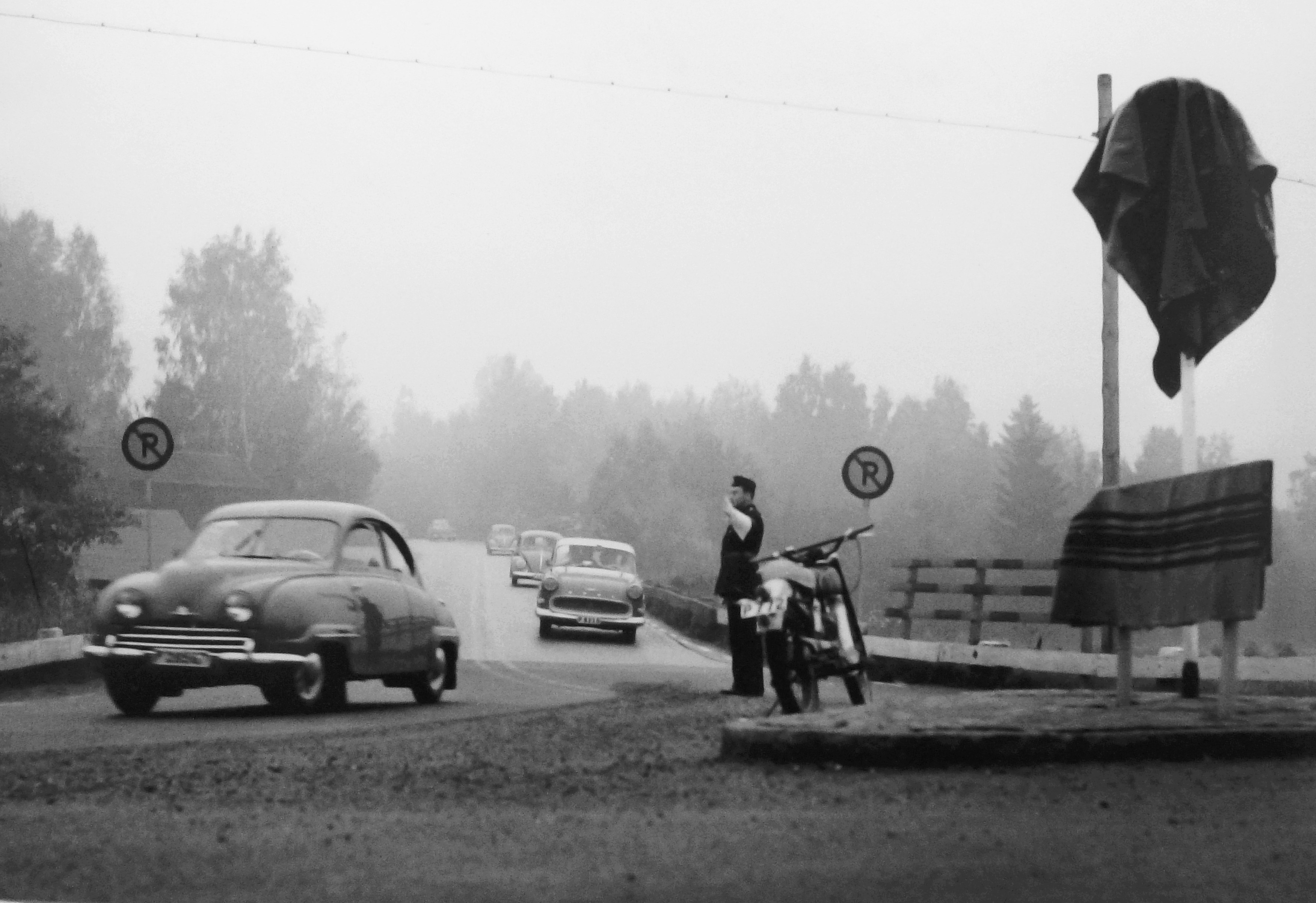 Stockholms läns museets utställning: Atombomb över Stockholm / Operation Stockholm